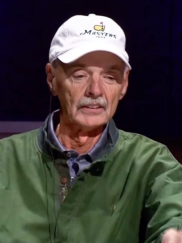 Bill Klein beim WPT Alpha8 in Las Vegas